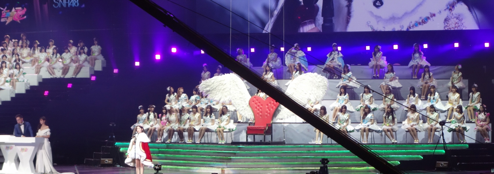 第一的约定鞠婧祎 完成约定了 (snh48总决选)